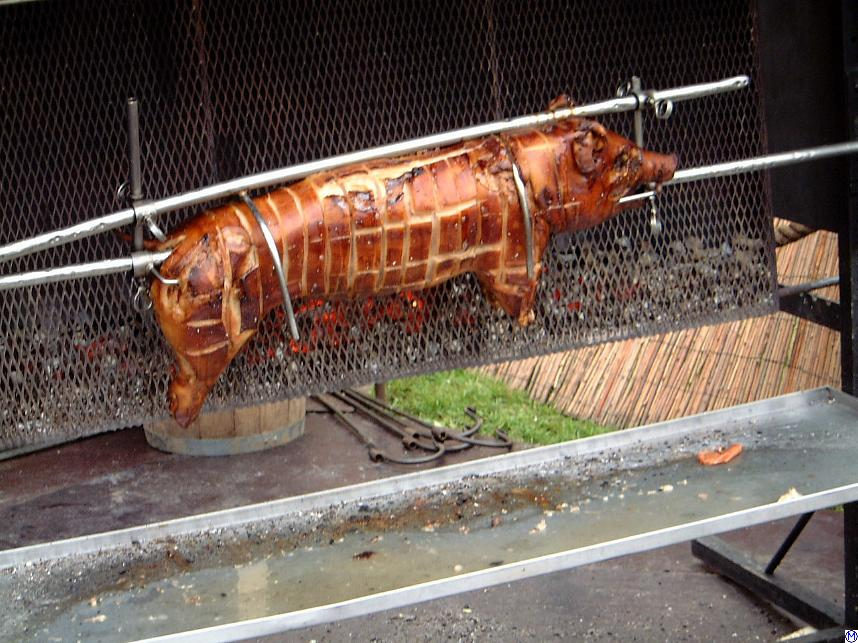 Jungschwein am Bratspieß